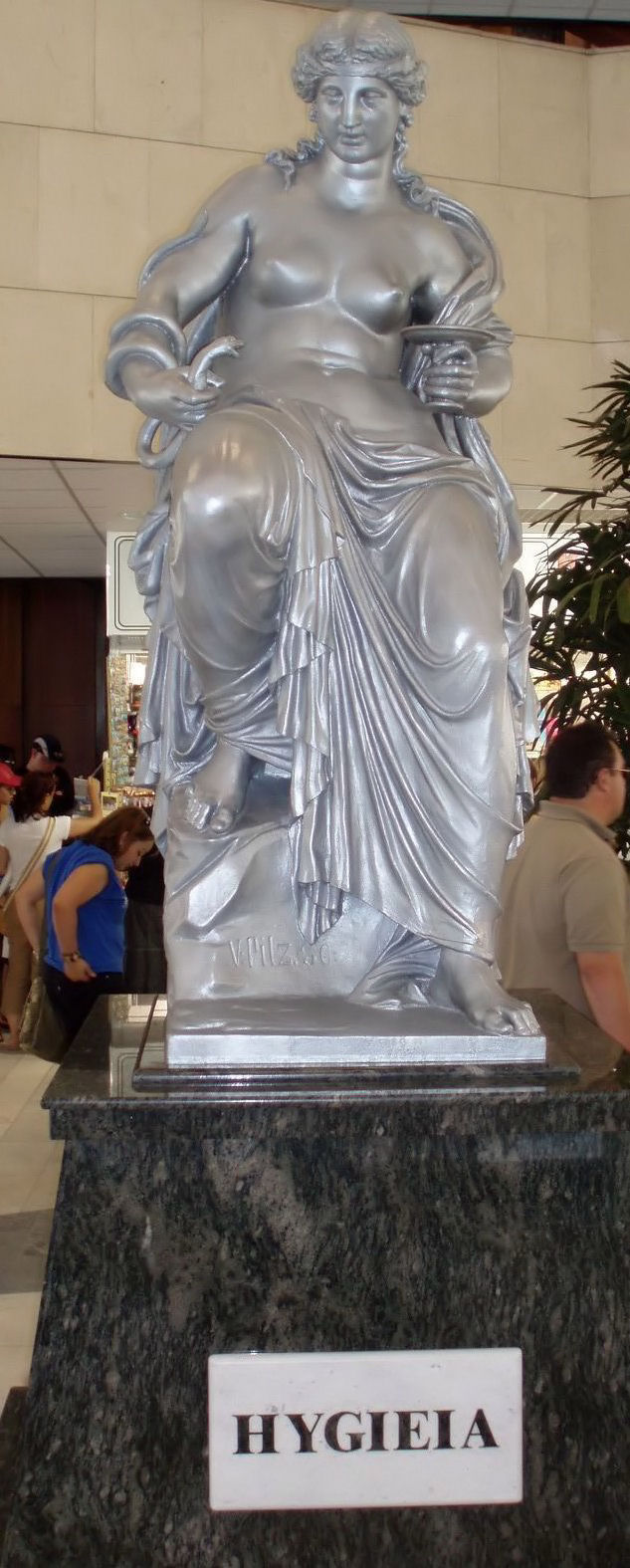 Hygieia foto made in Czech Republic, Karlovy Vary; Foto daryta Čekijoje, Karlovy Varuose.